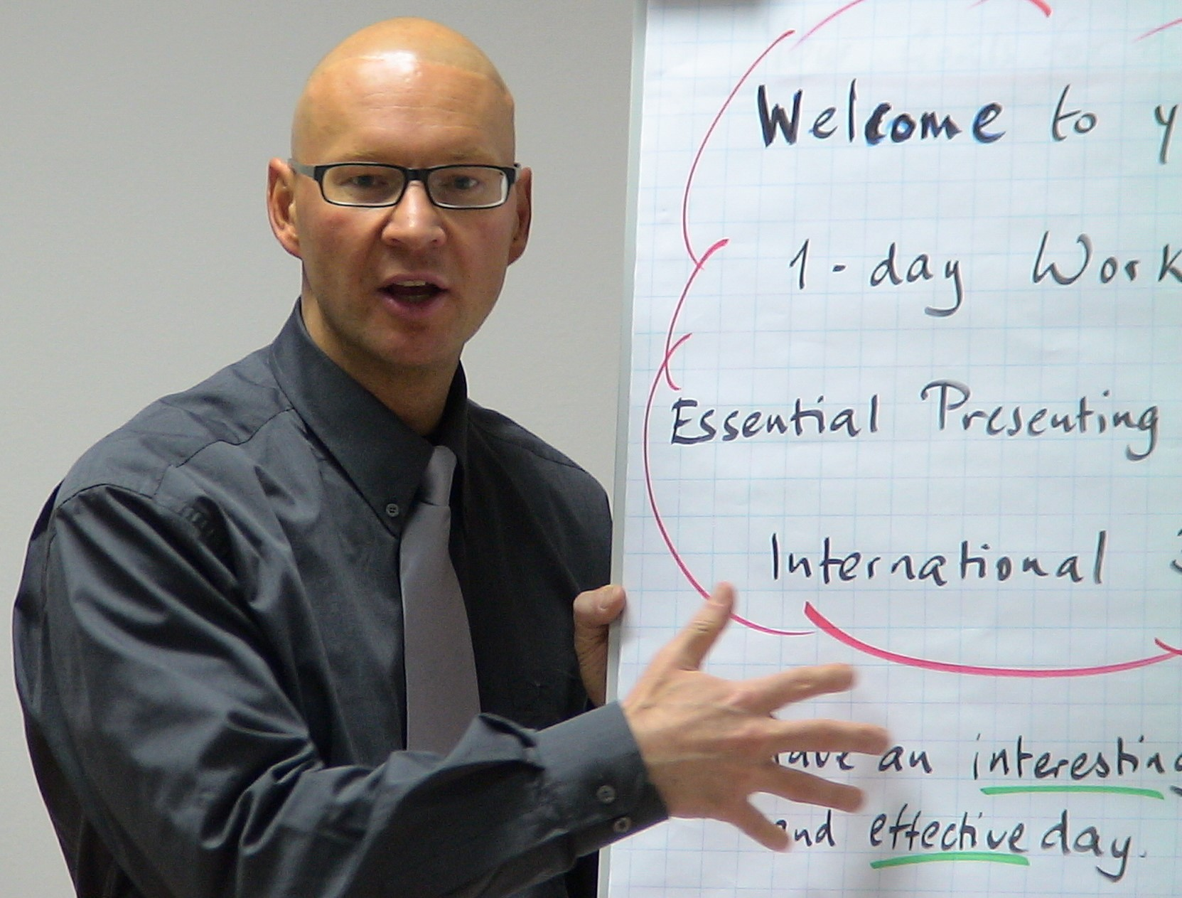 Der Präsentationstrainer PETER MOHR während einem Präsentationstraining.